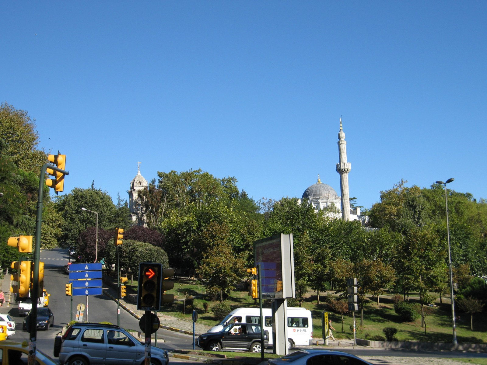 Yıldız quarter in Beşiktaş, Istanbul